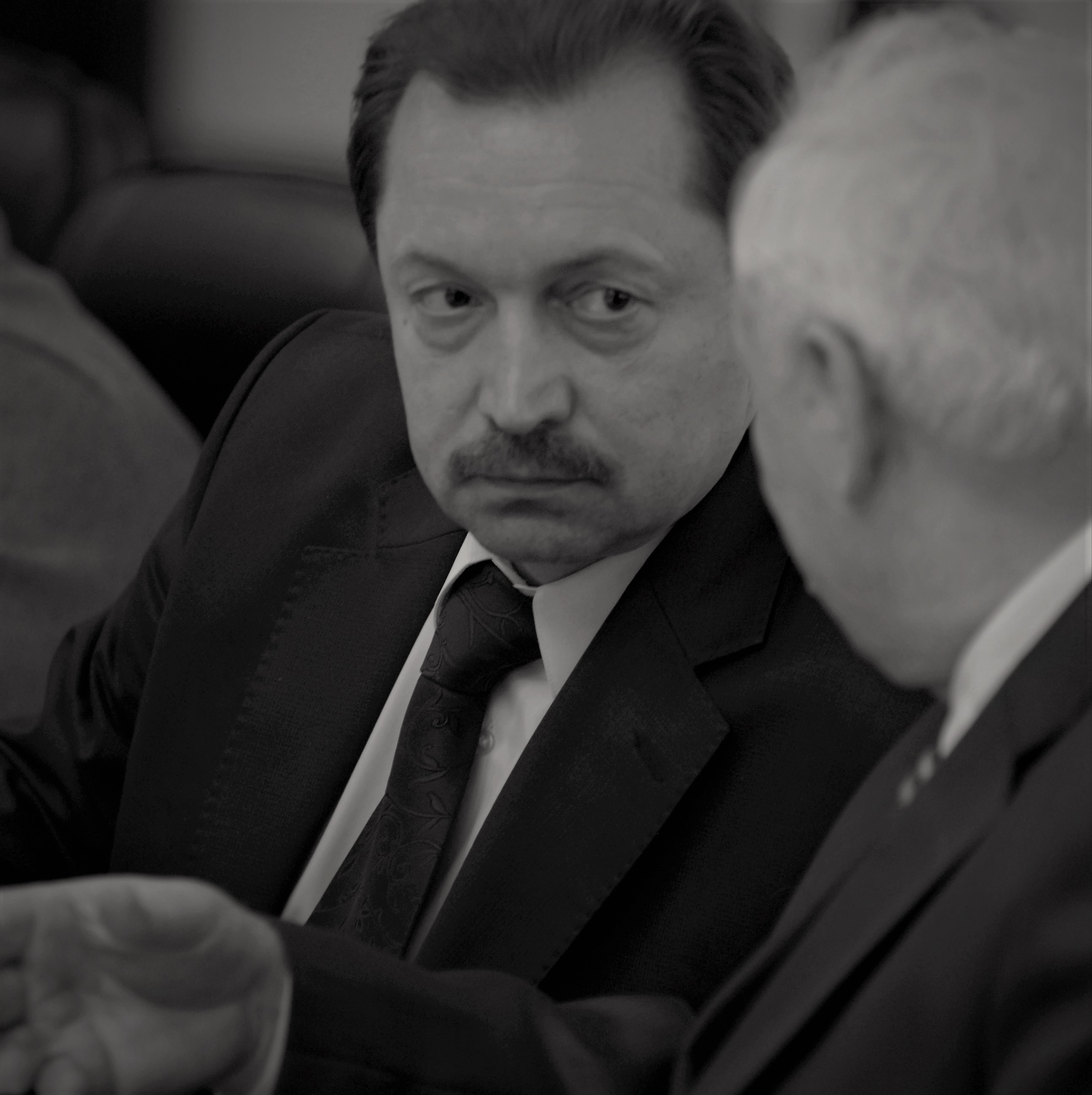 Володимир Поліщук нарада в МВС